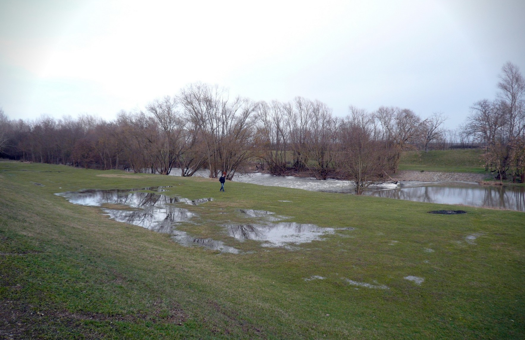 Sonkád, Hungary